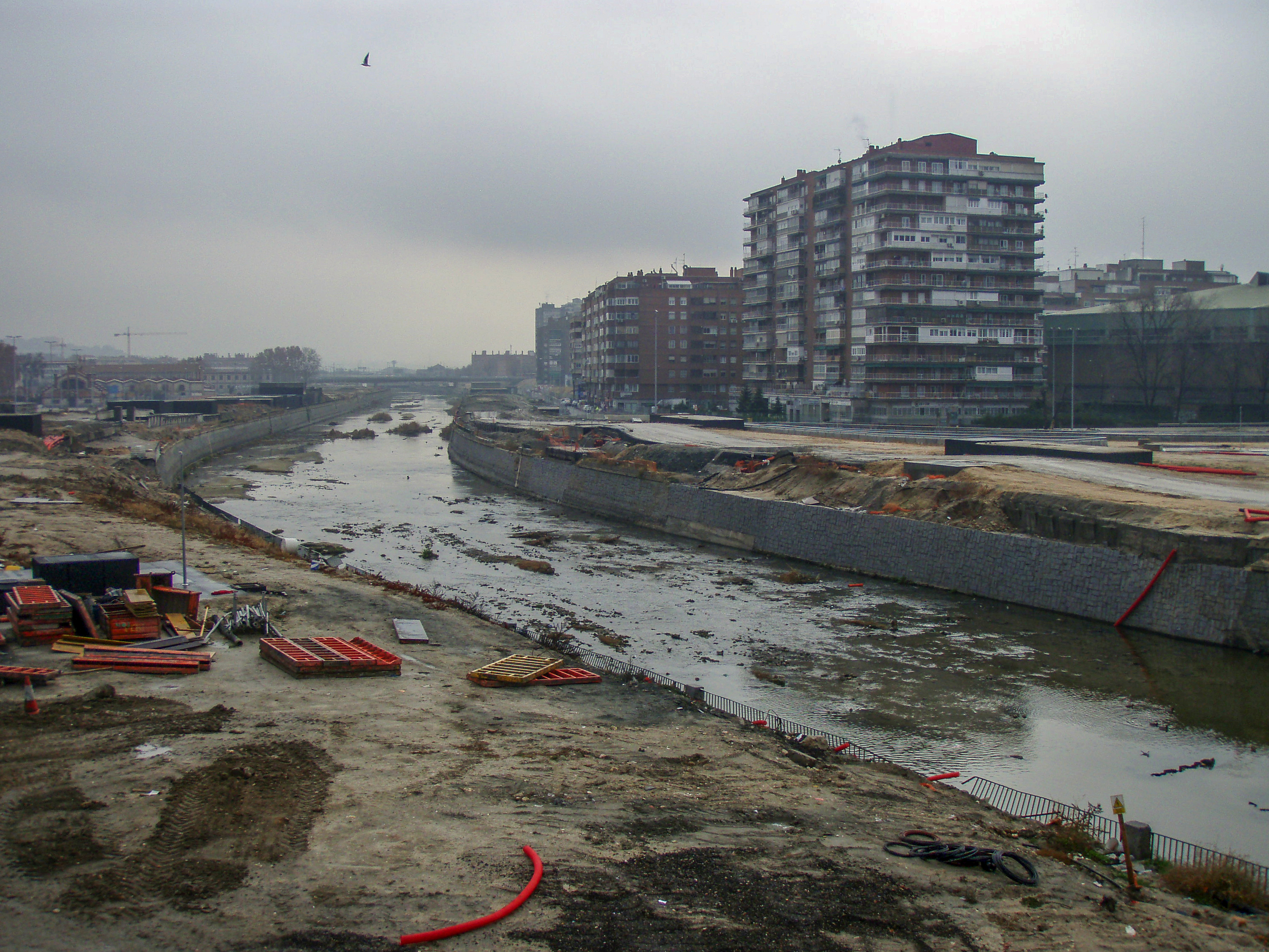 La playa de Madrid